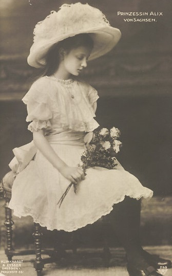 Prinzessin Maria Alix von Sachsen, später Prinzessin von Hohenzollern-Sigmaringen 1901 – 1990